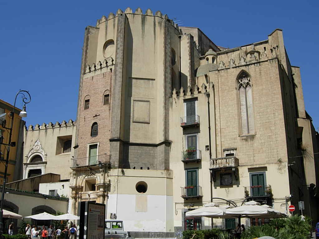 Napoli - Chiesa di San Domenico Maggiore Foto personale